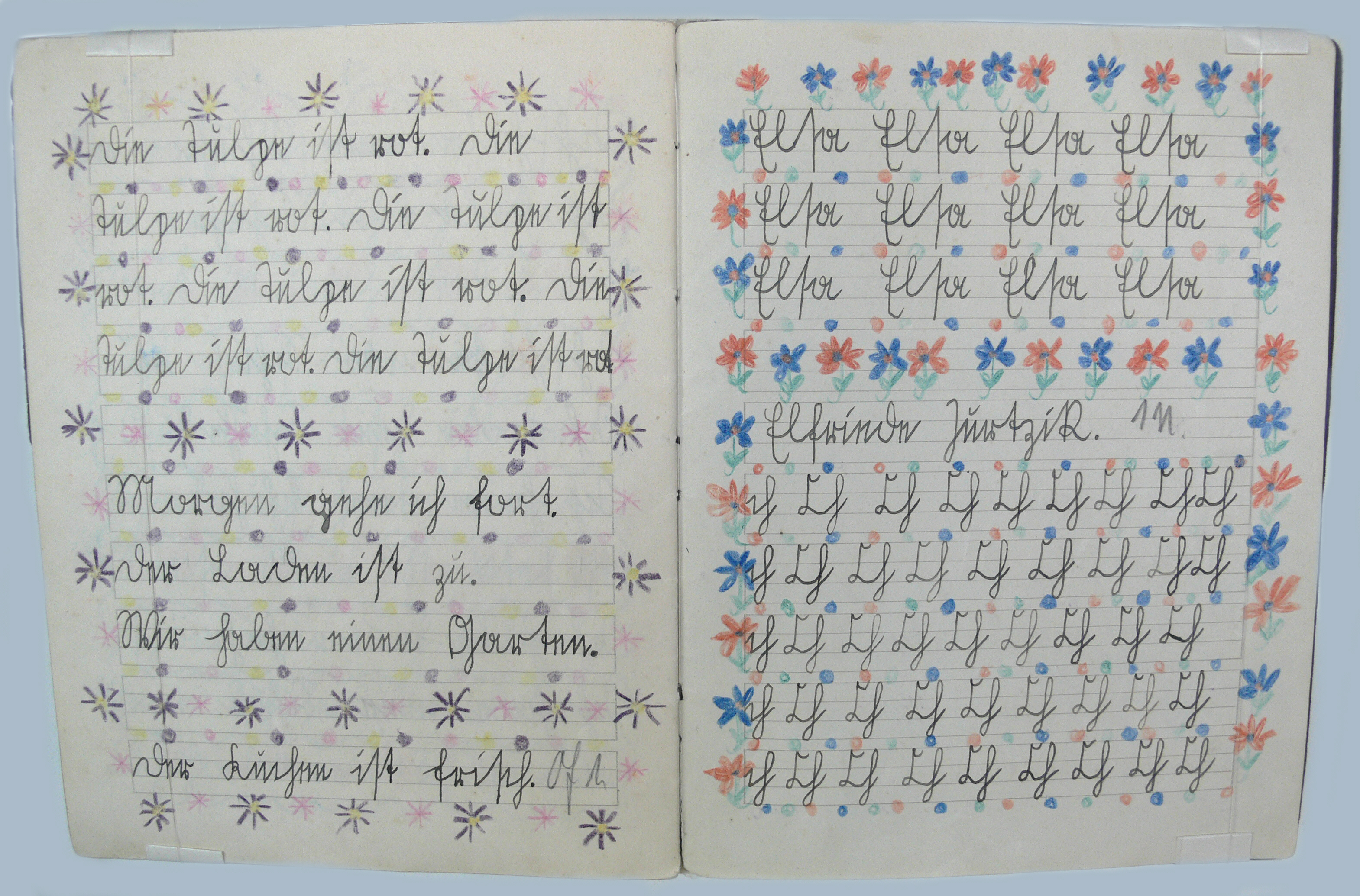 Sammlung Kindheit und Jugend (Stiftung Stadtmuseum Berlin) Schulheft mit Schreibübungen, 1929 Die Tulpe ist rot. (...) Morgen gehe ich fort. Der Laden ist zu. Wir haben einen Garten. Der Kuchen ist frisch. Elsa. [...] Elfriede Jurtzik. ch Ch Ch Ch Ch Ch Ch Ch Ch [...]